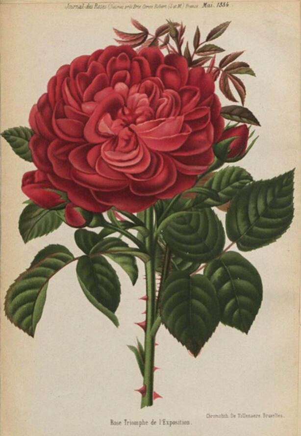 Rose hybride remontant 'Triomphe de l'Exposition' (Margottin, 1855), illustration dans le Journal des roses, mai 1884.